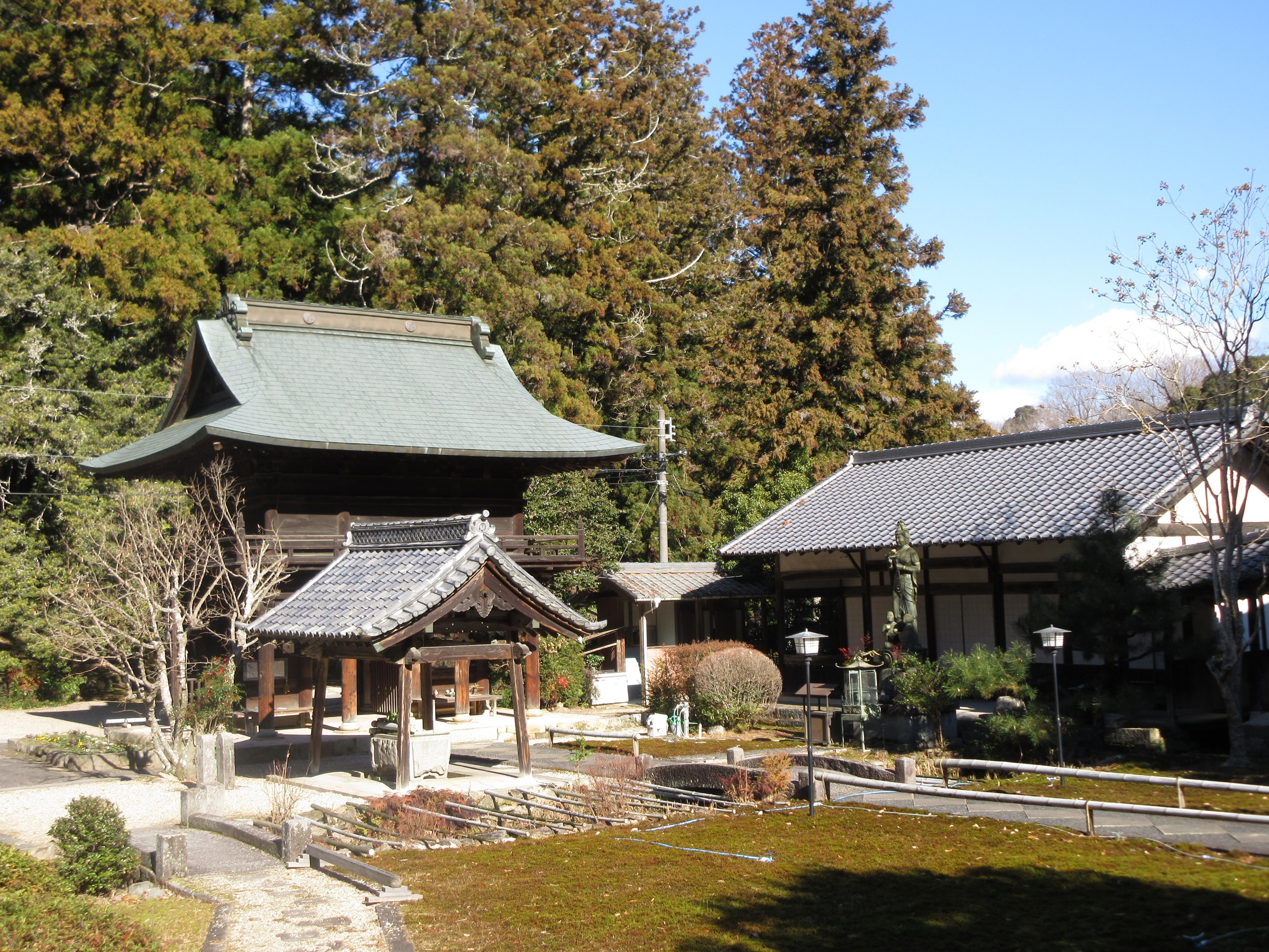 龍渓院（岡崎市桑原町）